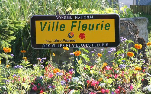 Ville fleurie , France.